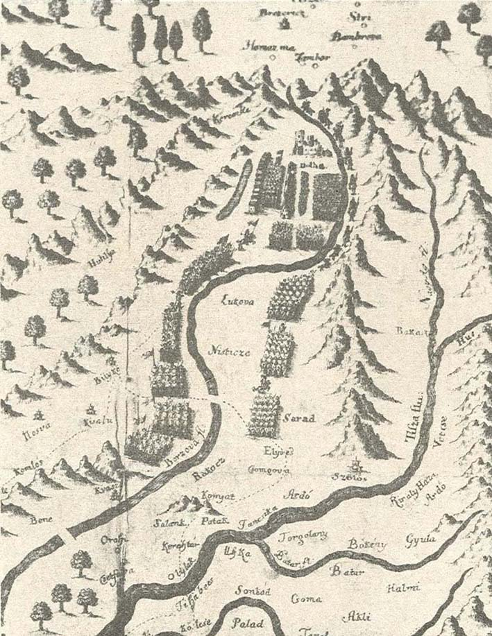 Карта битвы куруцов